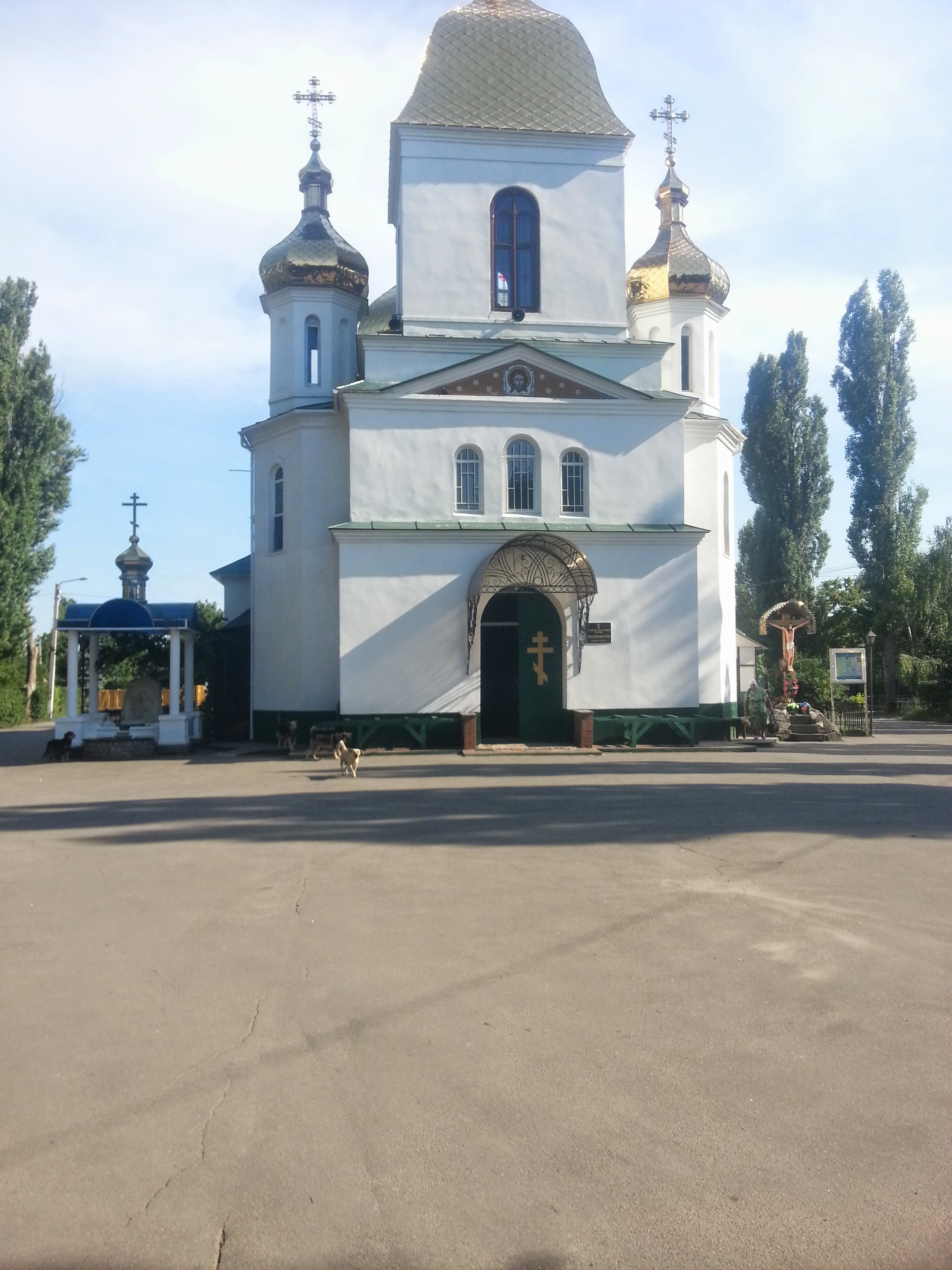 Церковь всех святых на Таировском клабище